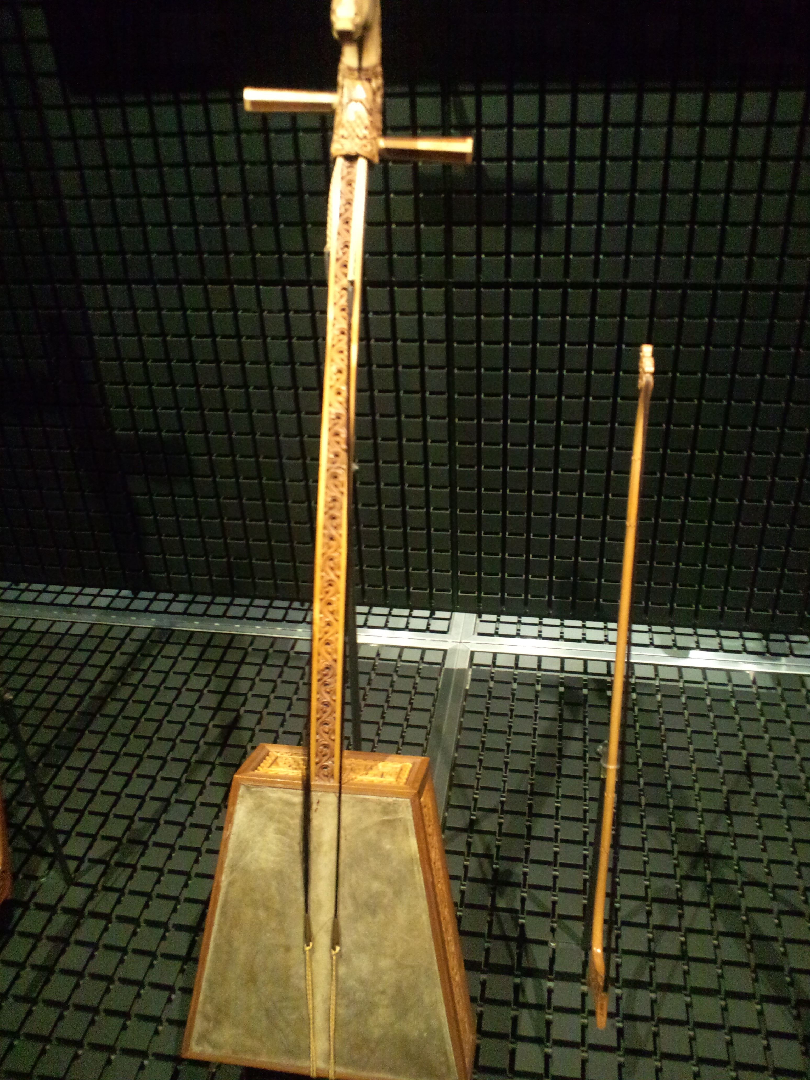 国立民族学博物館（大阪） 馬頭琴（モンゴル）